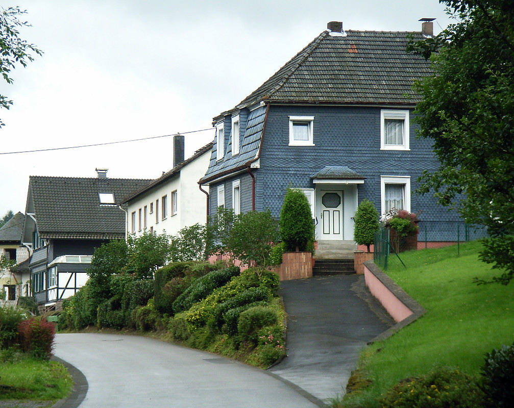 view of Schönenberg, district of Gummersbach, North Rhine-Westphalia, Germany